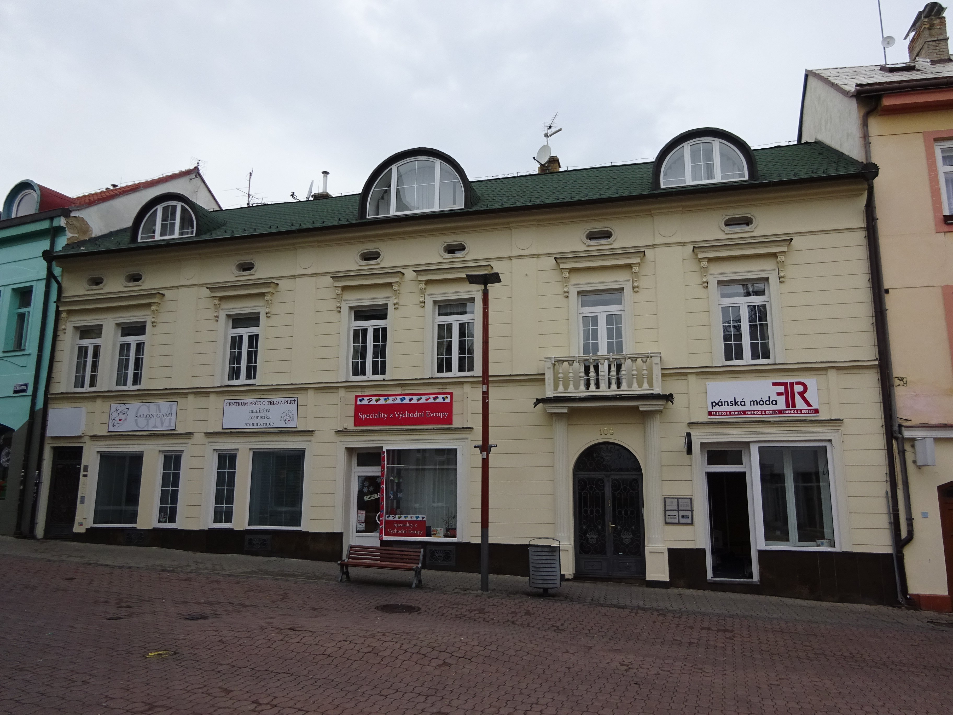 Rodný dům Václava Hromady